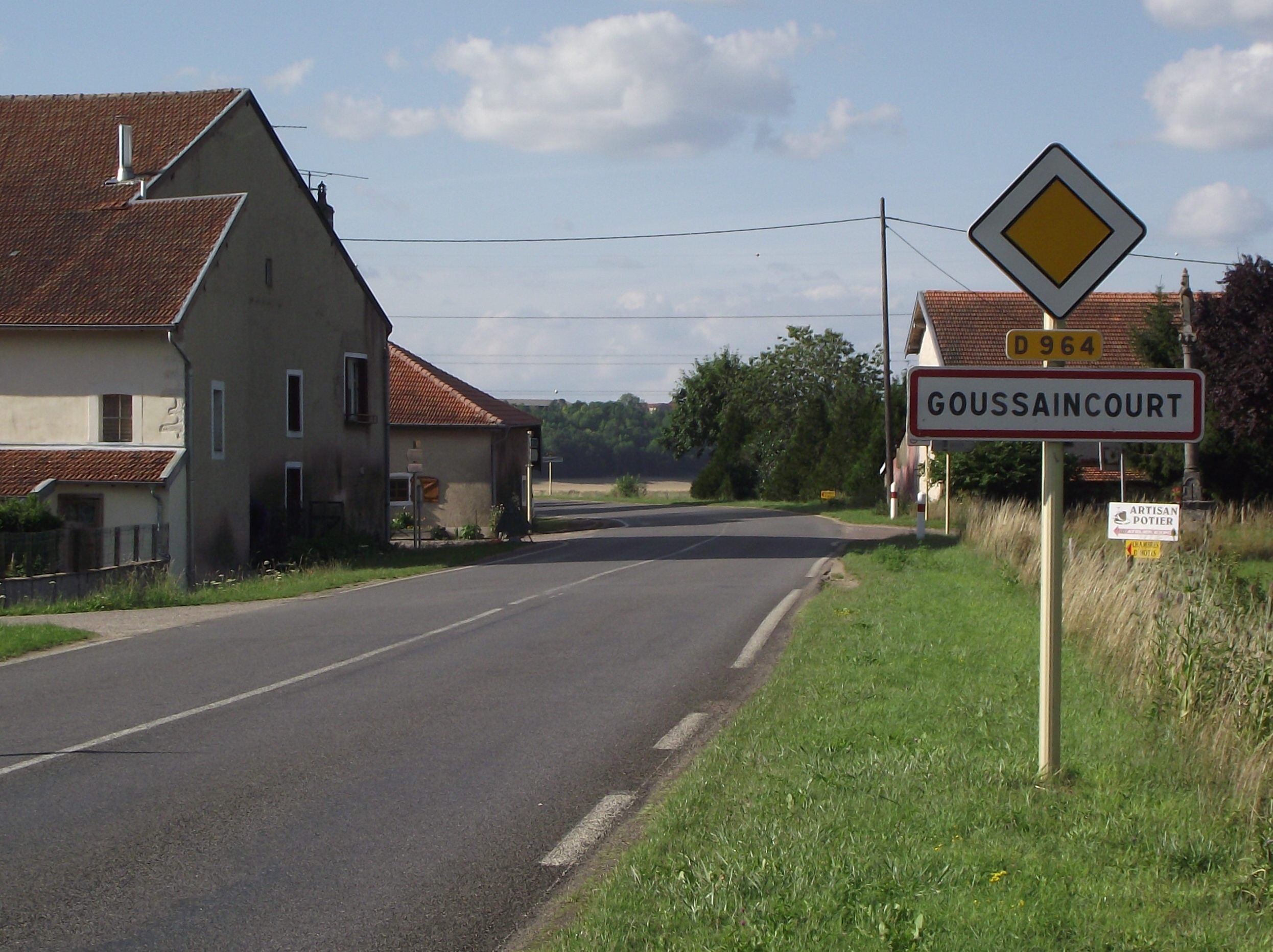 Entrée village de Goussaincourt